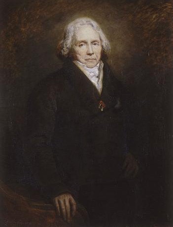 Charles-Maurice de Talleyrand-Périgord (1754-1838)